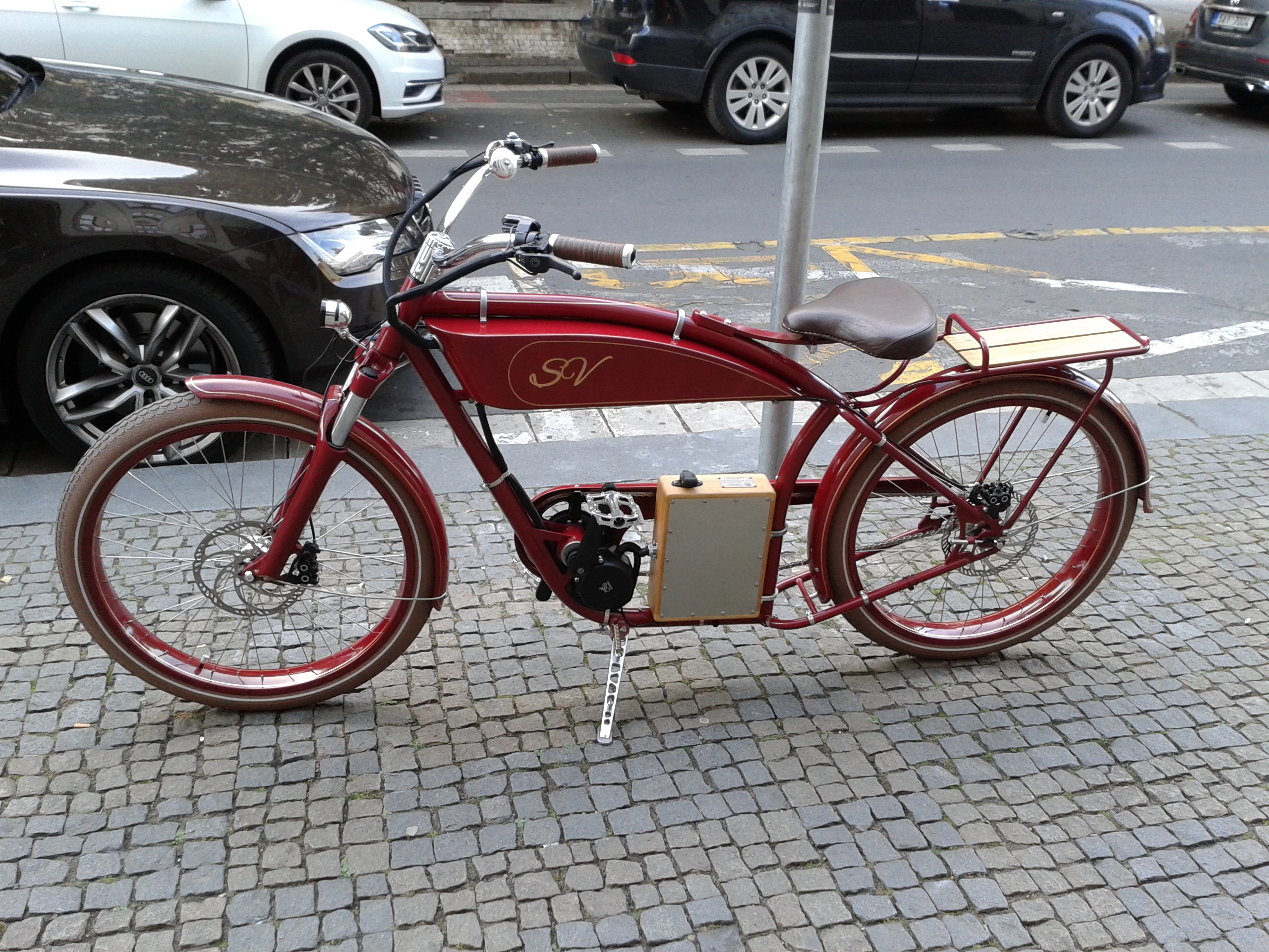 SVBike, městské stylové elektrokolo s retro designem (dvě barevné varianty: ústřicově bílá a purpurově červená). Na výrobním štítku je uvedeno: „Hadncrafted by AGE COM, Czechia“. Kolo je vybaveno nosičem (viz dále), předním a zadním světlem, blatníky a krytem řetězu. Dojezd na úrovni 100 kilometrů. Akumulátor má kapacitu 23,2 Ah (Li-ion, 36V, 23 200 Wh) a je umístěn na rámové trubce v dřevěné retro skříňce. Standardní doba nabíjení akumulátoru s dodávanou 5 A nabíječkou je 3 hodiny. (Rychlonabíjení na 80% kapacity akumulátoru za 30 minut.) Nosnost retrokola až 140 kilogramů. (Odpružení sedla je řešeno jeho nastavitelným umístěním na ocelové pružině.) Elektromotor (250 W EV Bike Set CMS) má výkon 250 W a točivý moment 50 až 80 Nm. Maximální rychlost elektrokola je 25 km/hod. Pod sedlovou trubkou se nachází uzamykatelná schránka (ve tvaru „benzinové nádrže“) o rozměrech 50 × 10 × 15 cm určena na úschovu různých předmětů. Nad zadním kolem je umístěny dřevěný nosič opatřený bezpečnostním popruhem. Kolo je vybaveno odpruženou přední vidlicí Marzocchi 26” a kotoučovými hydraulickými brzdami Magura MT5E. Celková hmotnost kola je 38 kg. Orientační cena (s DPH) 134 673,- Kč.